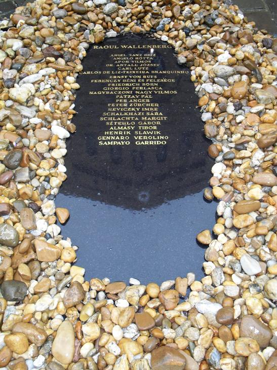 Zsidómentők emlékműve (Dohány utcai zsinagóga, Budapest)